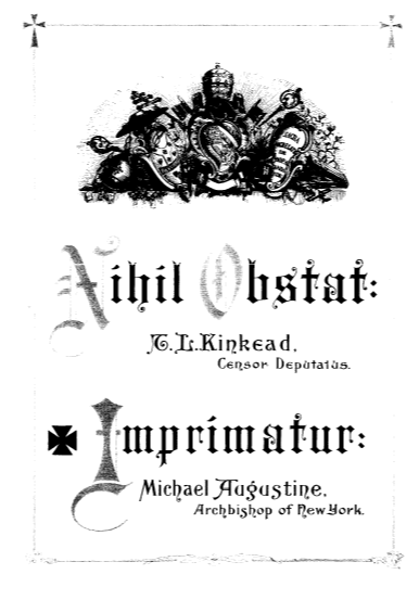 Een voorbeeld van imprimatur en nihil obstat in een boek. Afbeelding gevonden op website: Geen duidelijk copyright, boektitel zeker ouder dan 100 jaar.